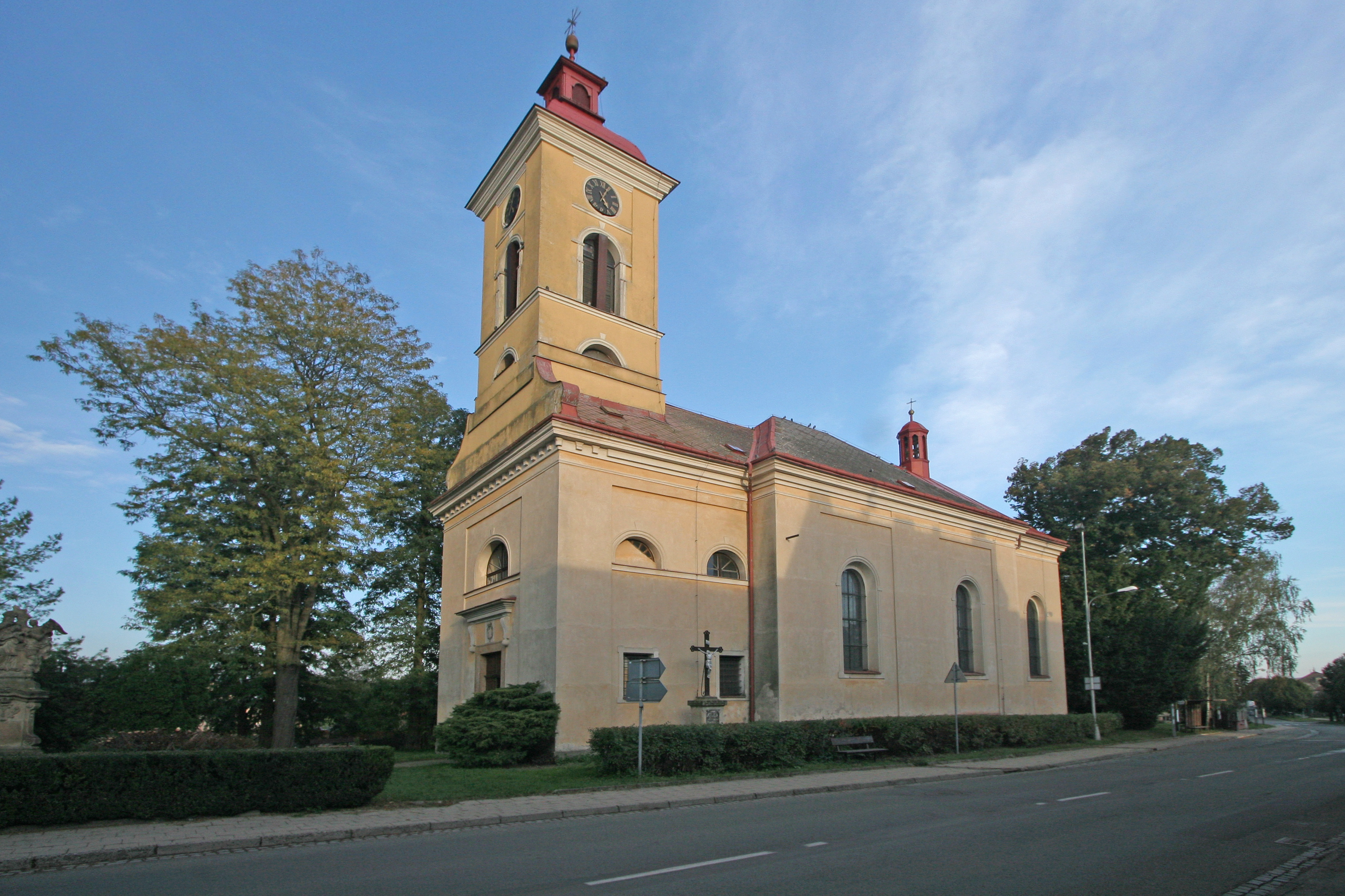 Kostel sv. Marka Evangelisty (Stěžery), Stěžery